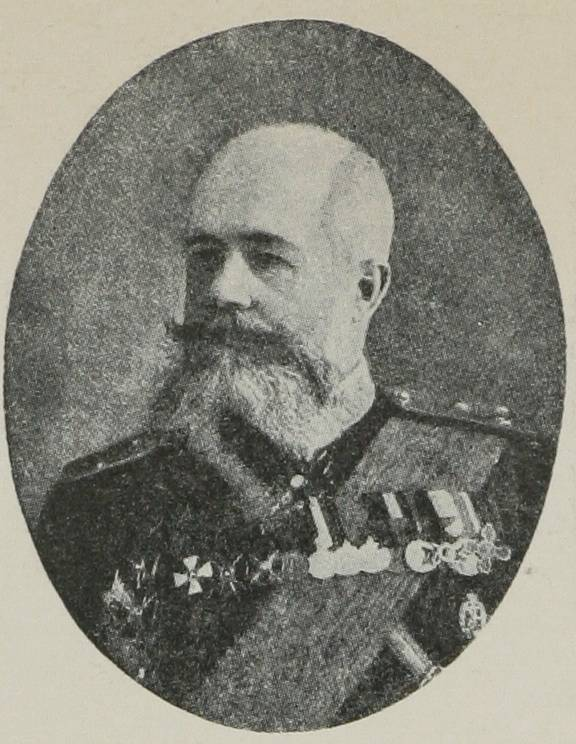 Это изображение было использовано для иллюстрирования статьи «Кашталинский, Николай Александрович» опубликованной в двенадцатом томе «Военной энциклопедии», который был издан книгоиздательским товариществом И. Д. Сытина в 1913 году в столице Российской империи городе Санкт-Петербурге. Более подробное описание к этой картинке можно прочесть в указанной выше статье.